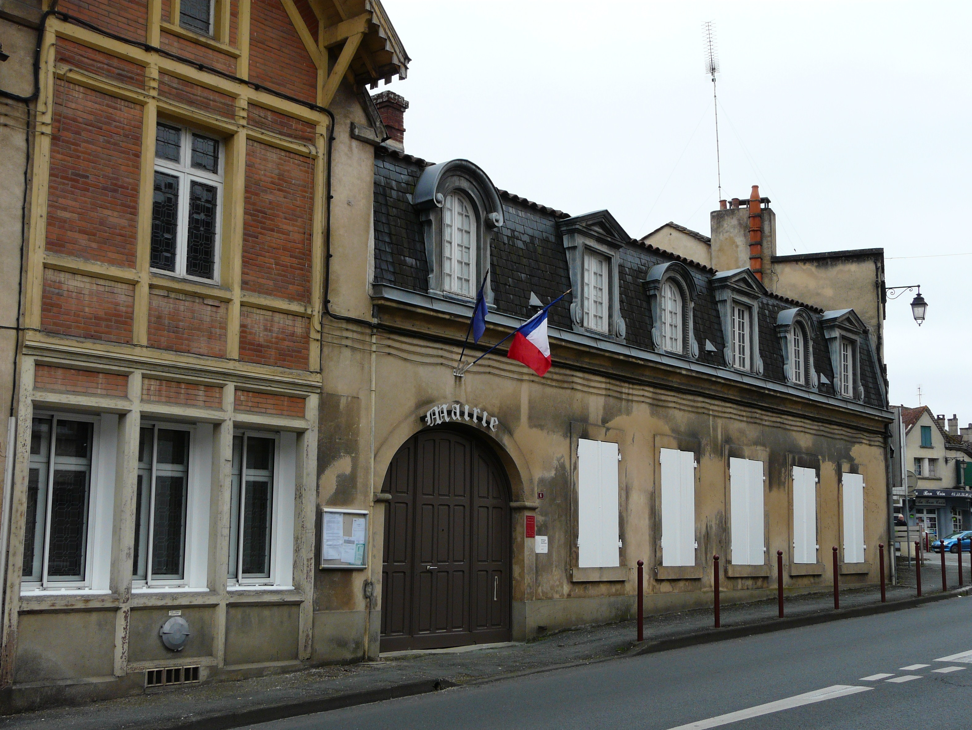 La mairie de Mouleydier, Dordogne, France.